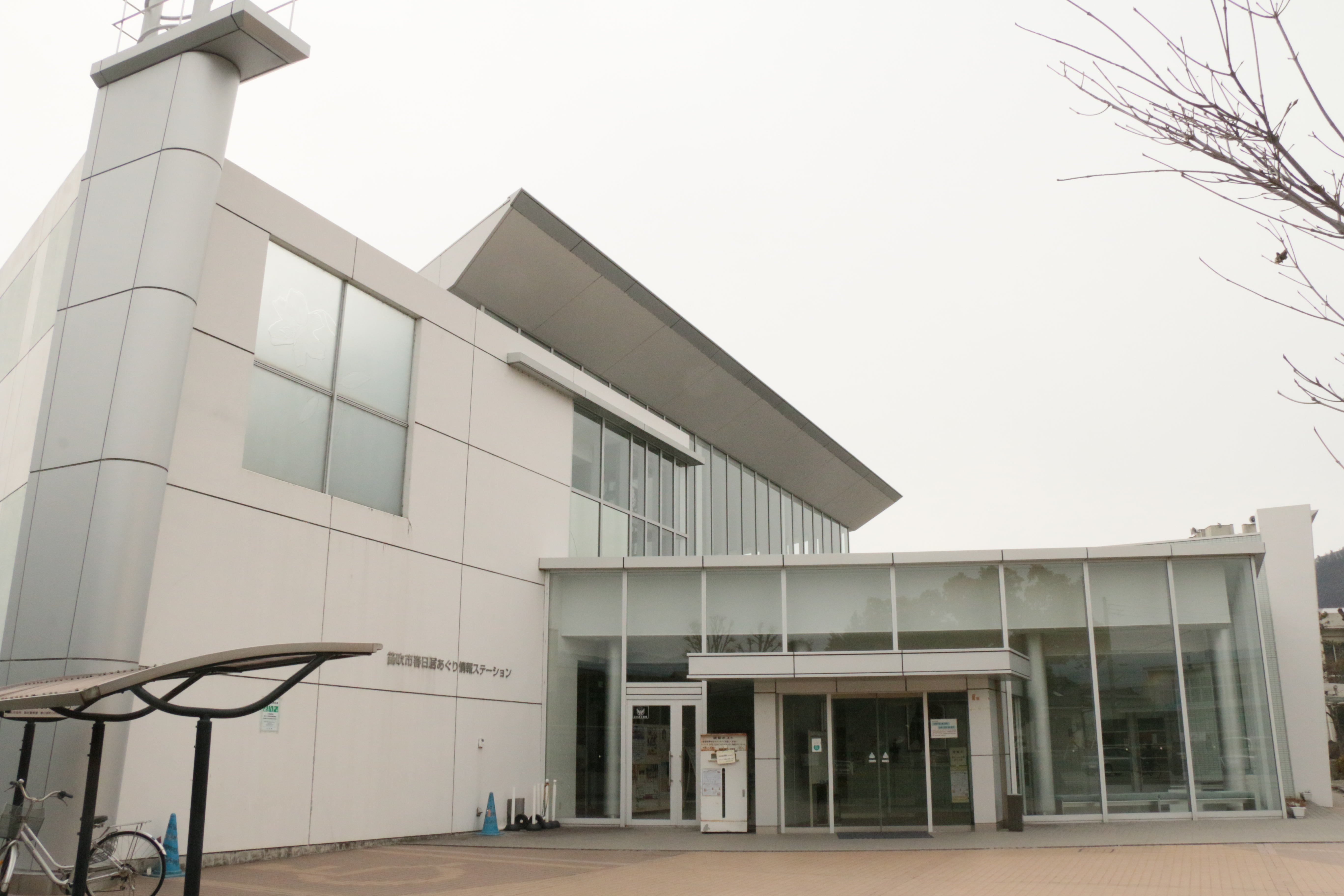 笛吹市春日居ふるさと図書館